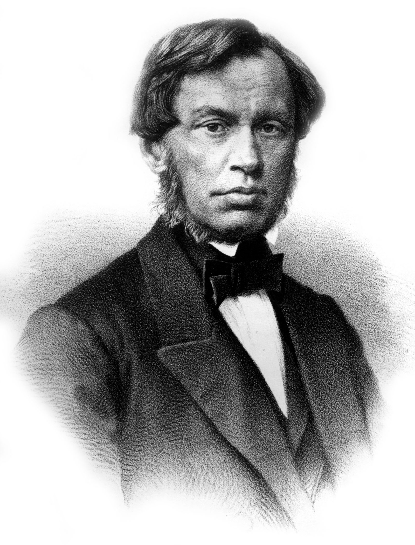 A. SAVITSCH. Фотогр. Захарьина. быв. Шпак. Лит. А. Мюнстера, СПБ. Imp. Lith. A. Munster (Editeur)